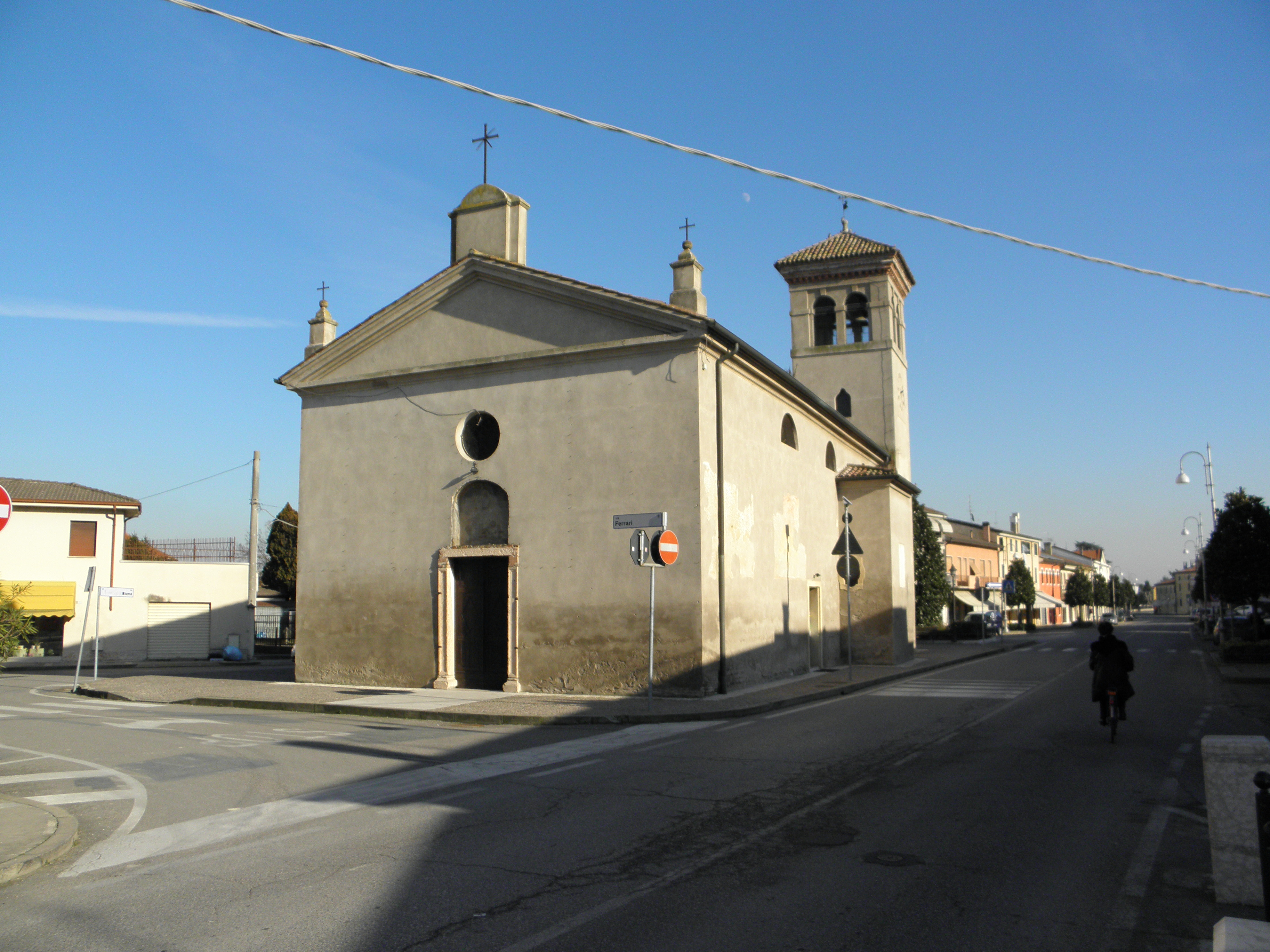 Isola Rizza, la chiesa di Santa Maria della Piazza, detta anche chiesa di Santa Maria Janua Coeli (XV secolo).